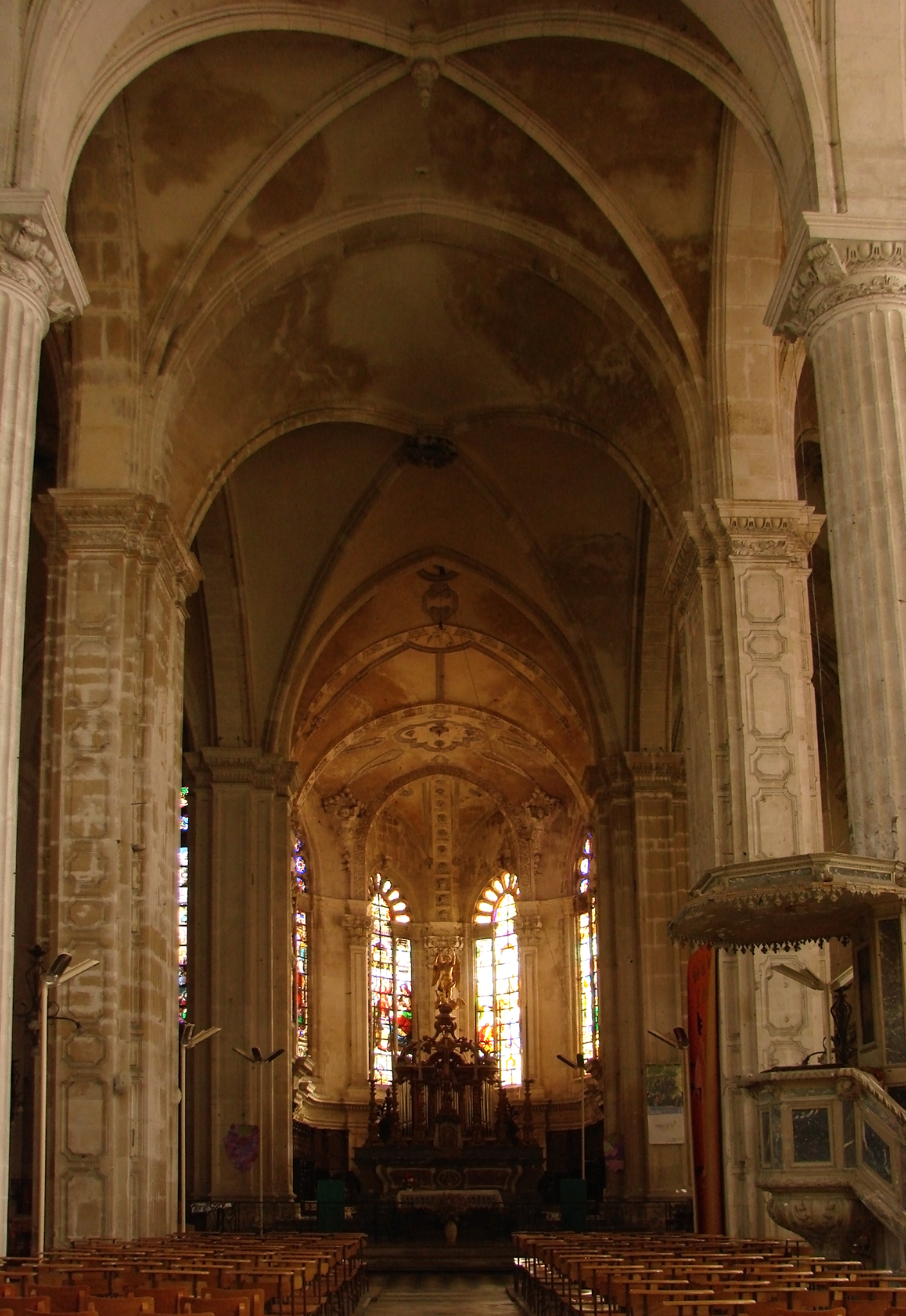 Choeur de l'église abbatiale Saint-Michel à Saint-Mihiel, fin du 17ème siècle.